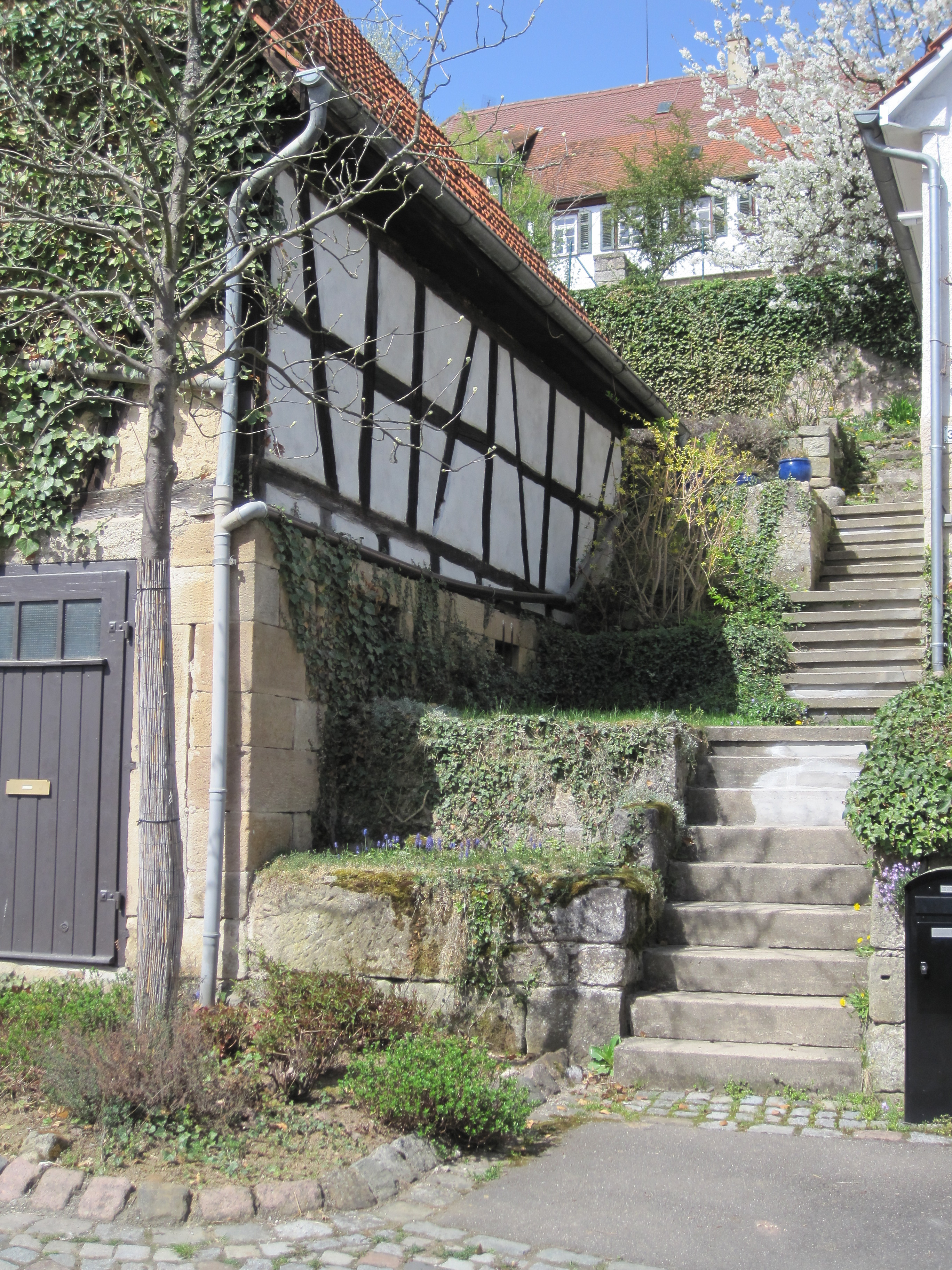 Treppe am Kirchberg in Aichtal-Aich